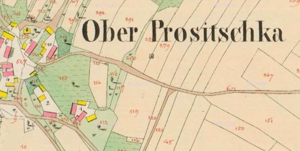 obec Horní Prosíčka - část císařského otisku stabilního katastru 1838